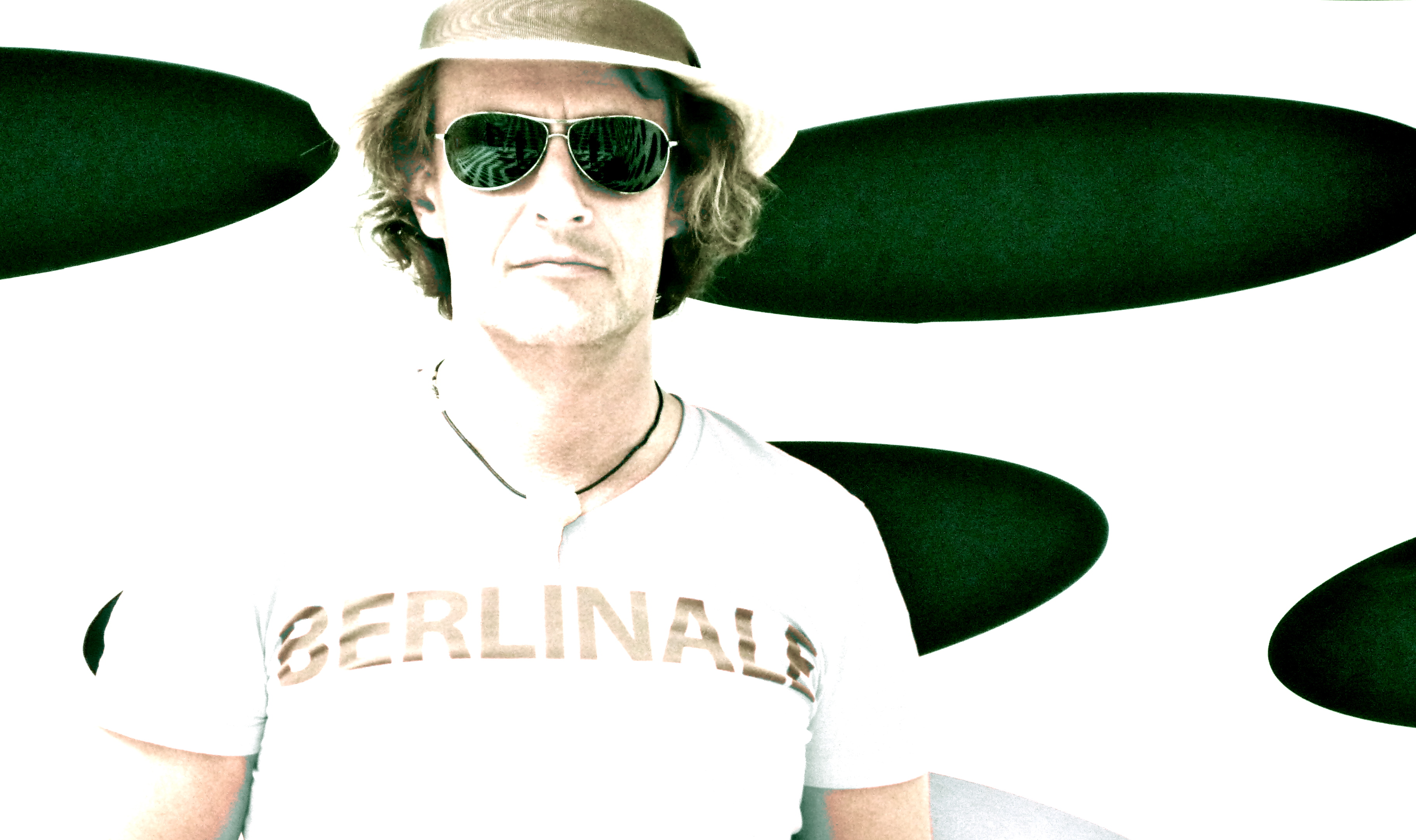 Gary Marlowe